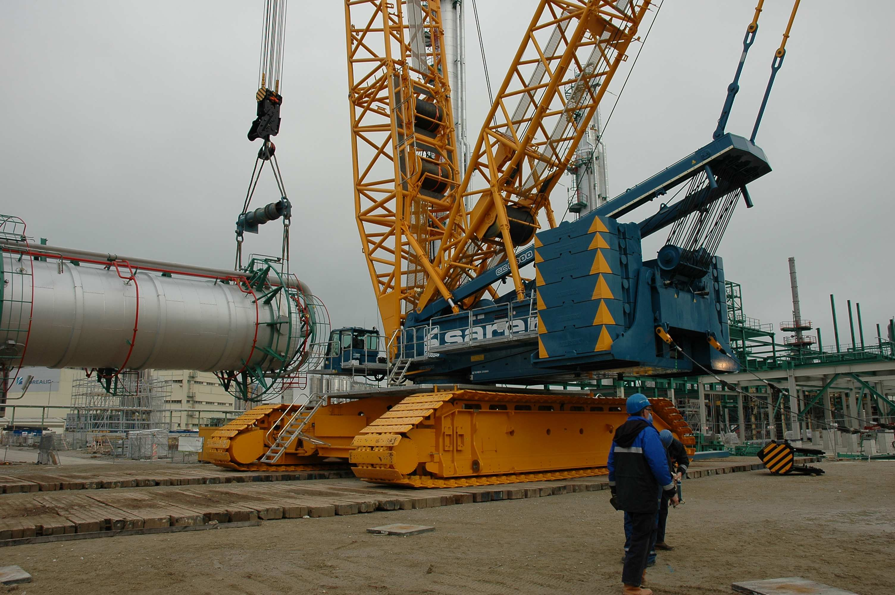 Terex-Demag CC6800 beim Heben eines Reaktors